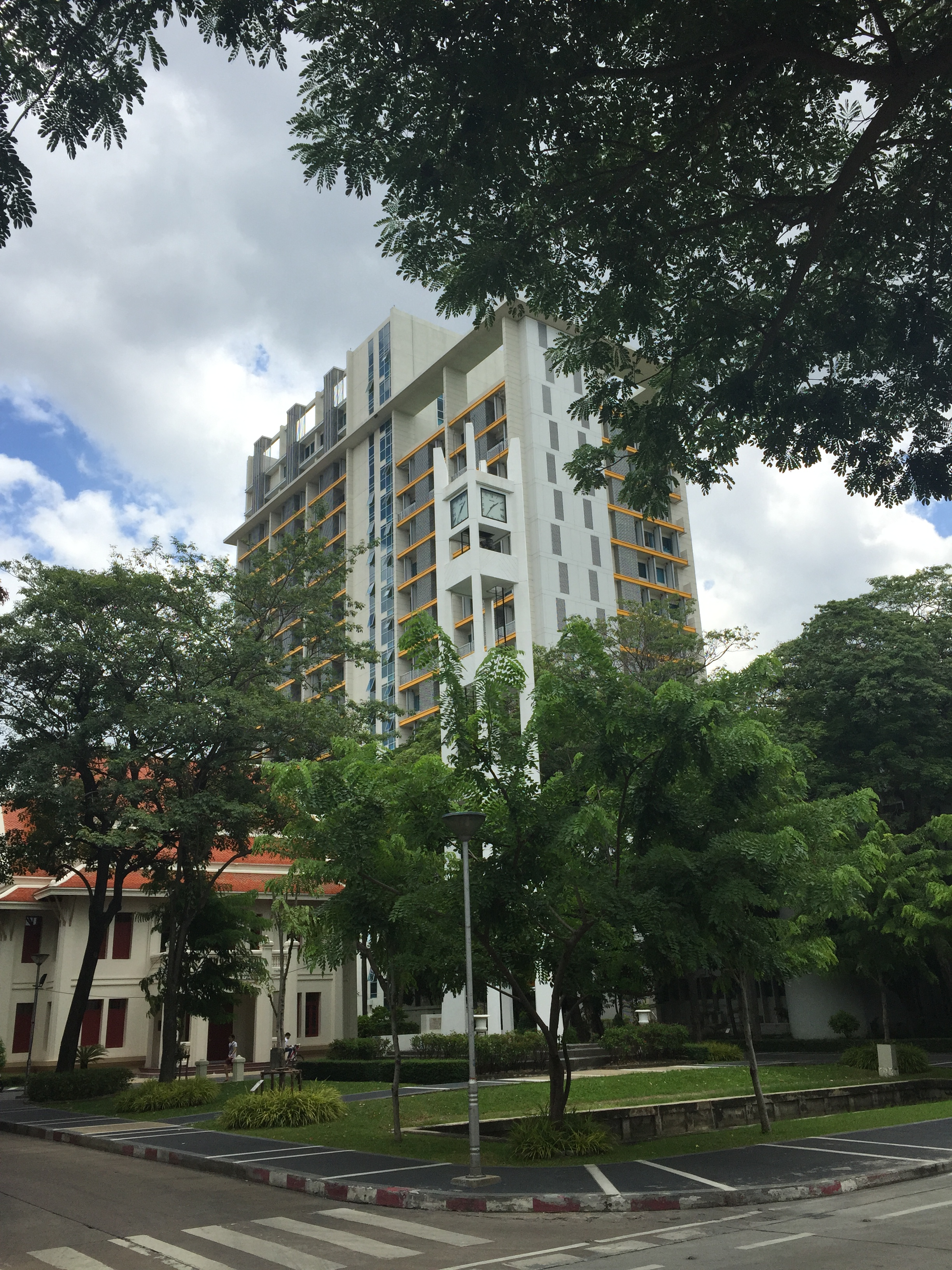 อาคารมหาวชิรุณหิศ คณะวิทยาศาสตร์อยู่ด้านหลังสุด ด้านซ้ายคือหอประวัติจุฬาฯ และตรงกลางคือหอนาฬิกา